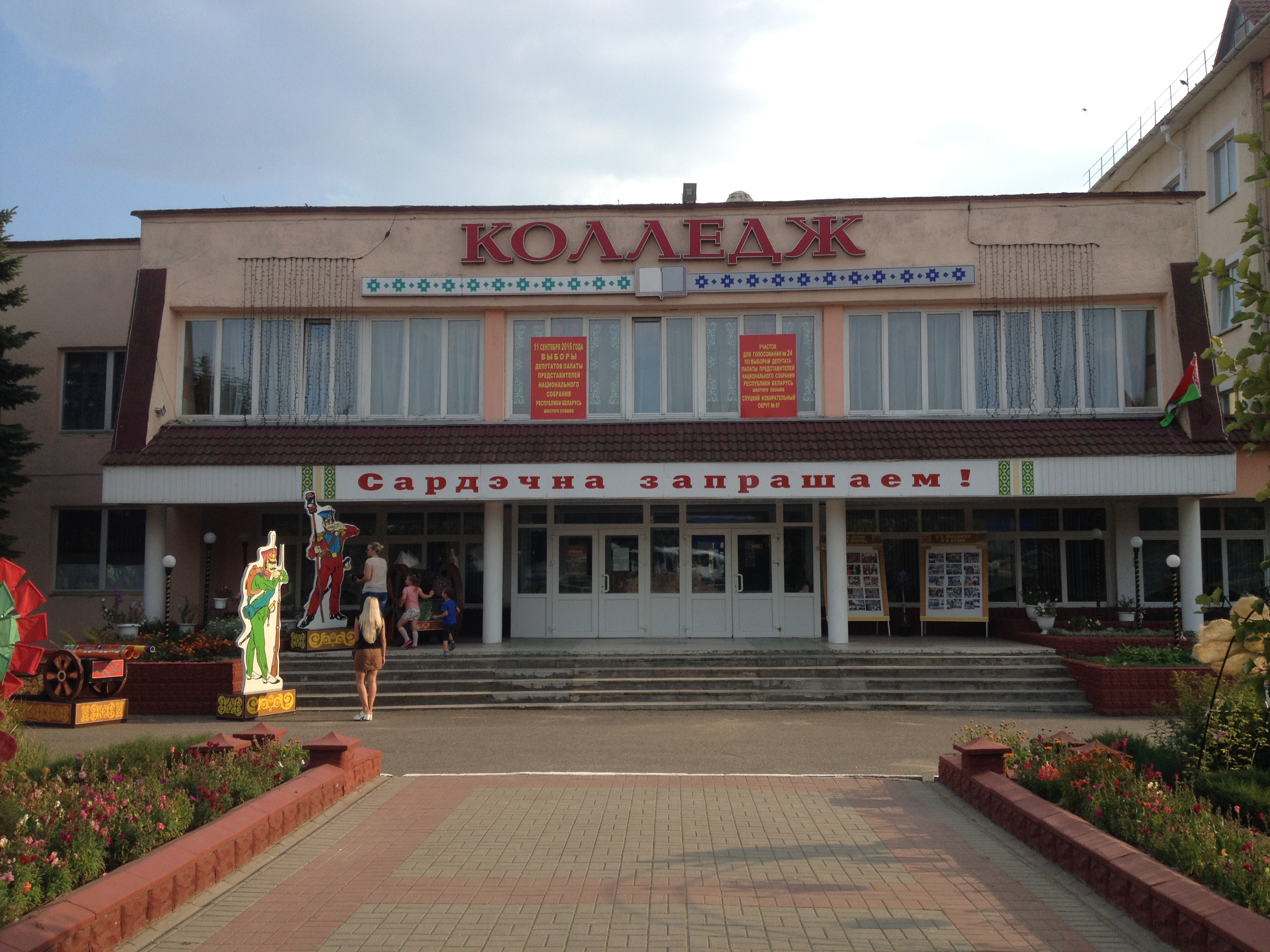 Wybory parlamentarne na Białorusi w 2016 roku.